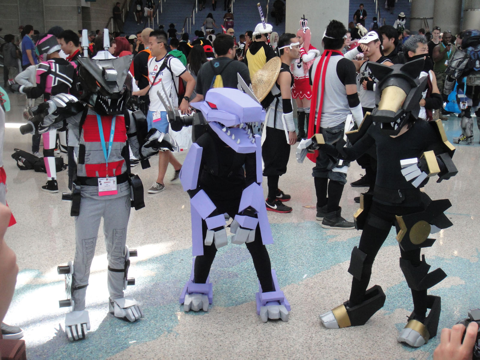 Anime Expo 2012